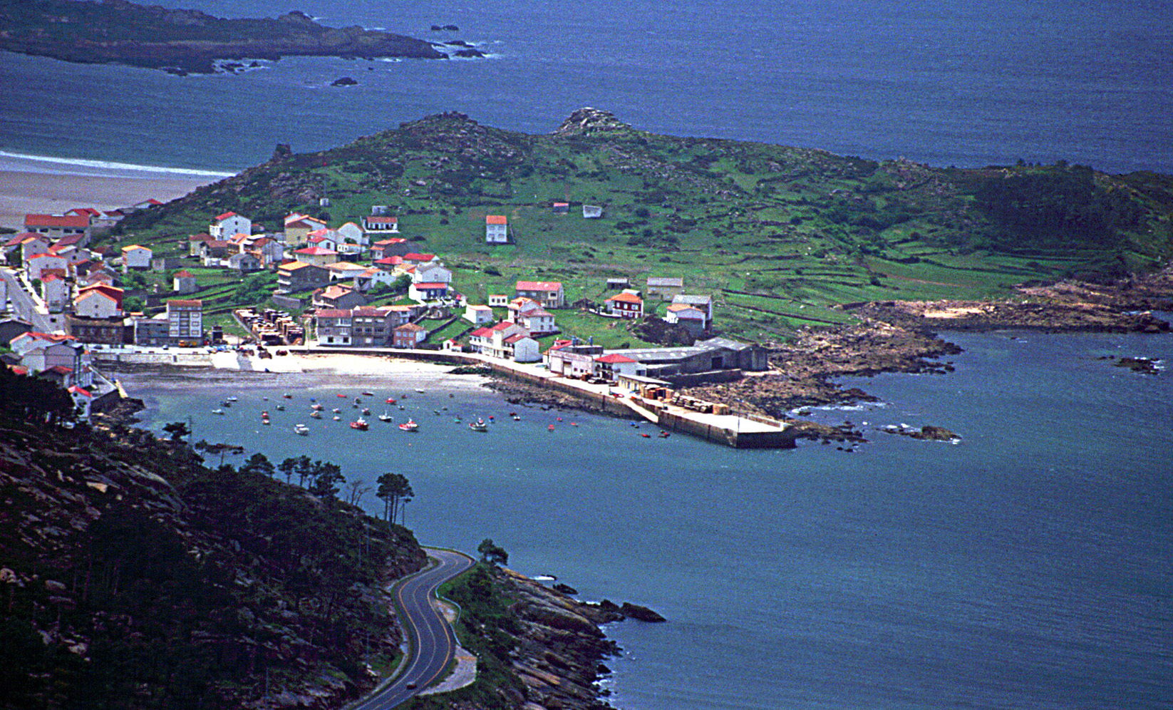 Puerto de O pindo